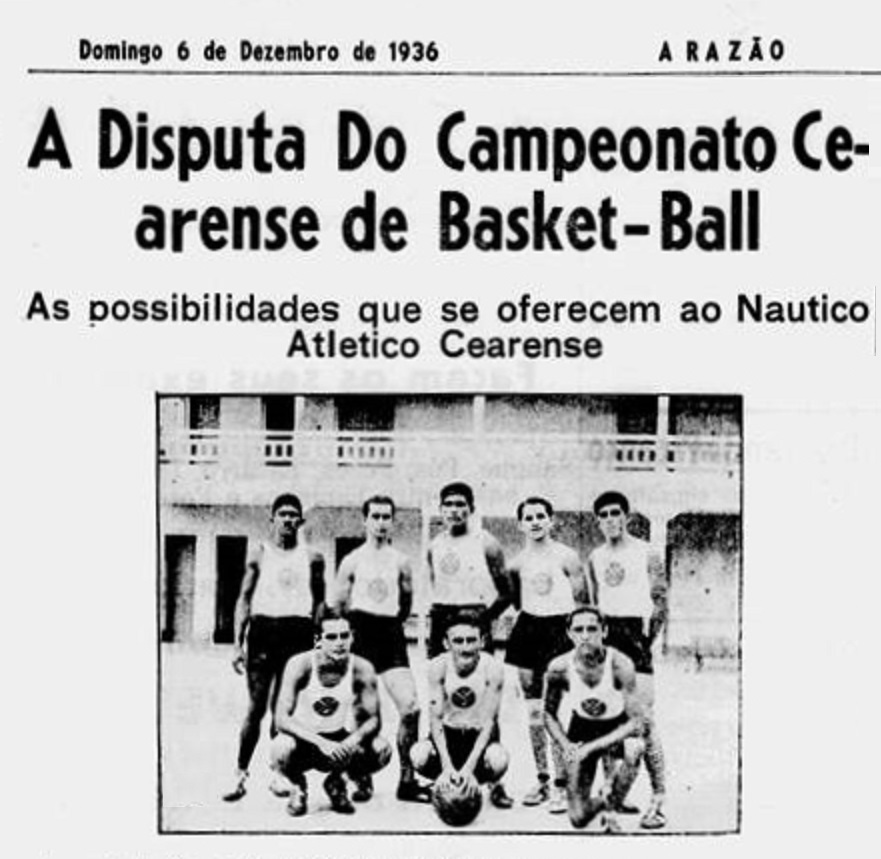 Jornal A Razão - 6 de Dezembro de 1936